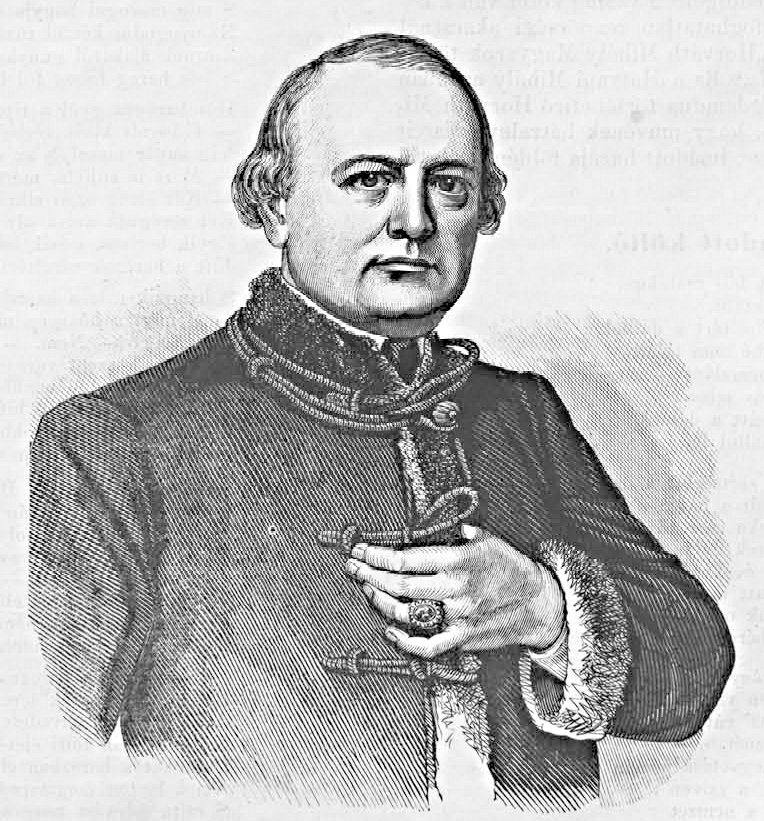 Horváth Mihály (1809–1878) politikus, miniszter, történész, püspök (Vasárnapi Ujság, 1861. augusztus 11.)